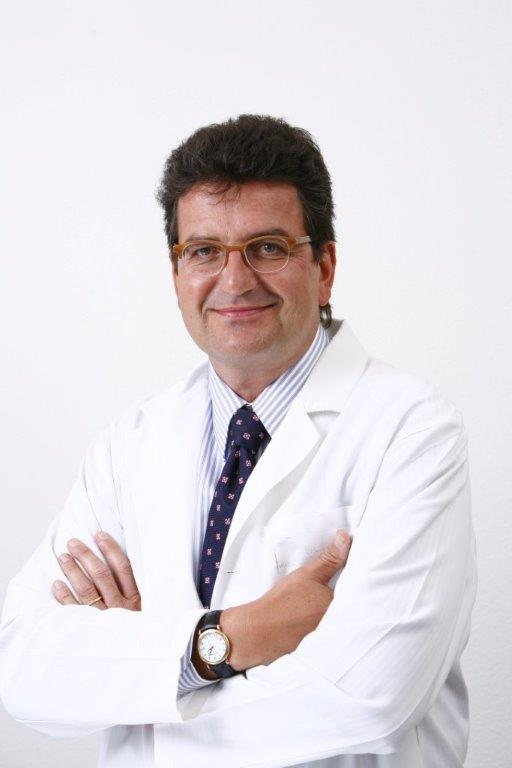 Poträtfoto von Daniel à Wengen